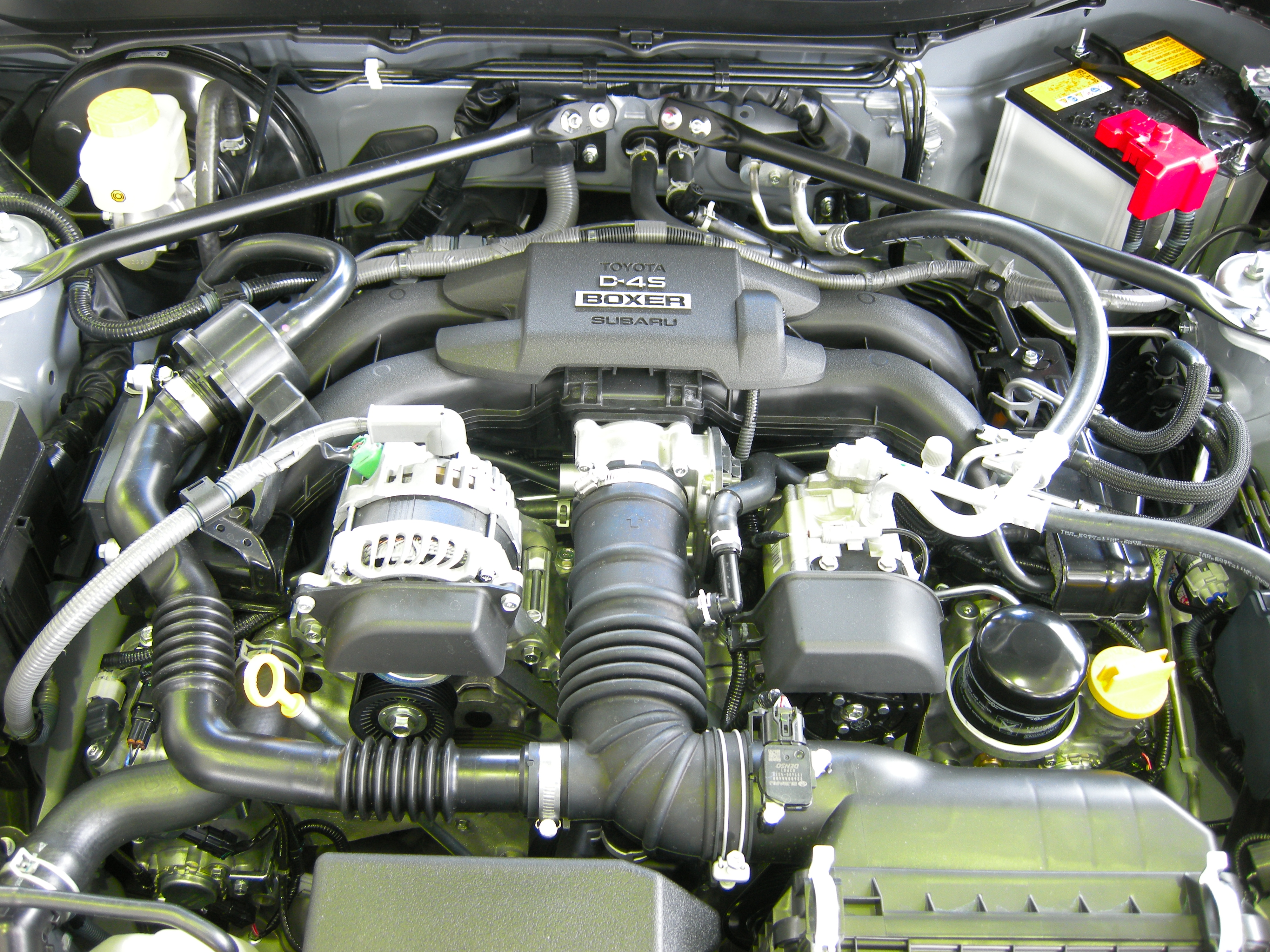 Toyota 86 engine